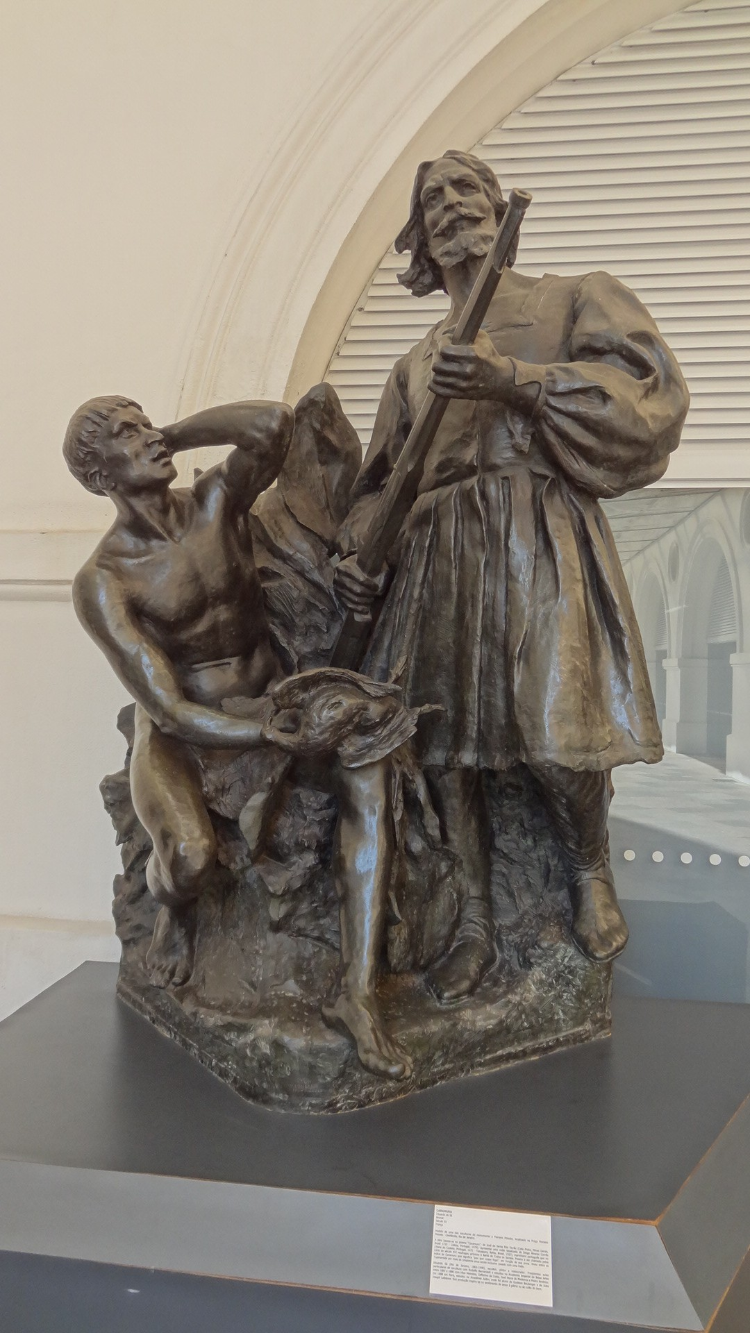 Museu Histórico Nacional, Rio de Janeiro